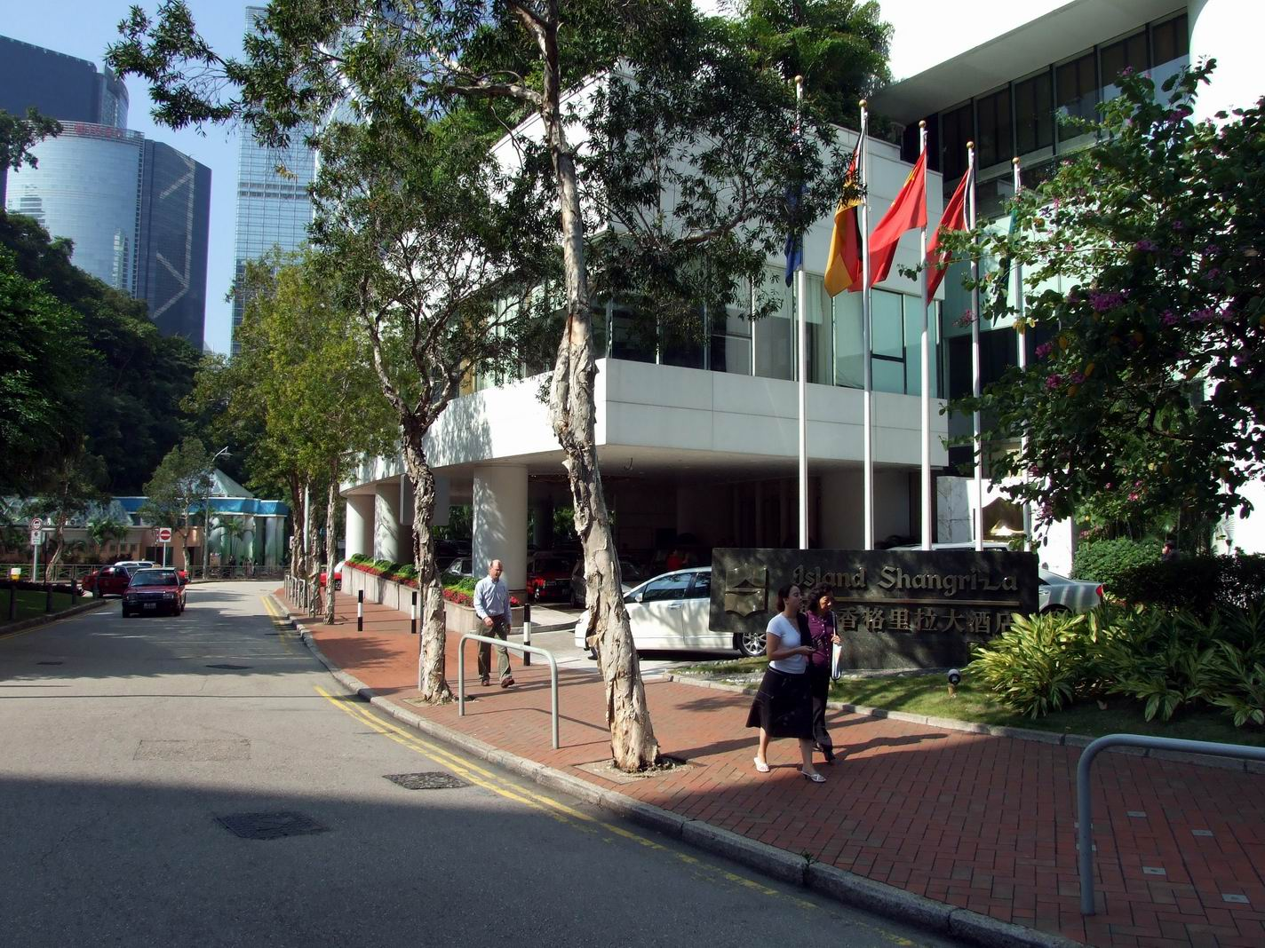 港島香格里拉酒店入口